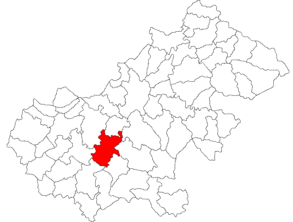 Categorie:Hărţi ale judeţului Satu Mare